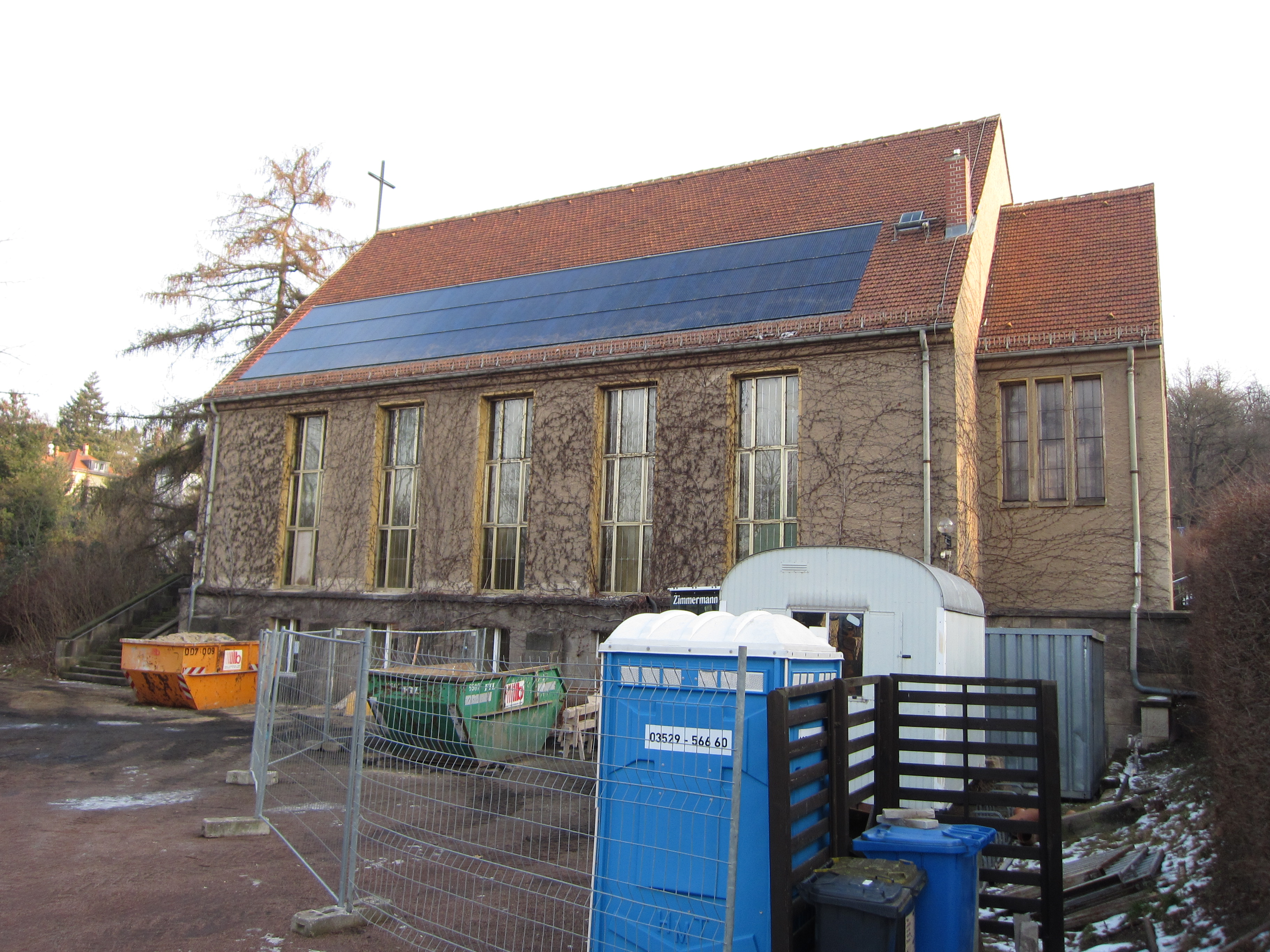 Weinbergskirche Dresden-Trachenberge während der Sanierungsarbeiten, Blick von Südwesten